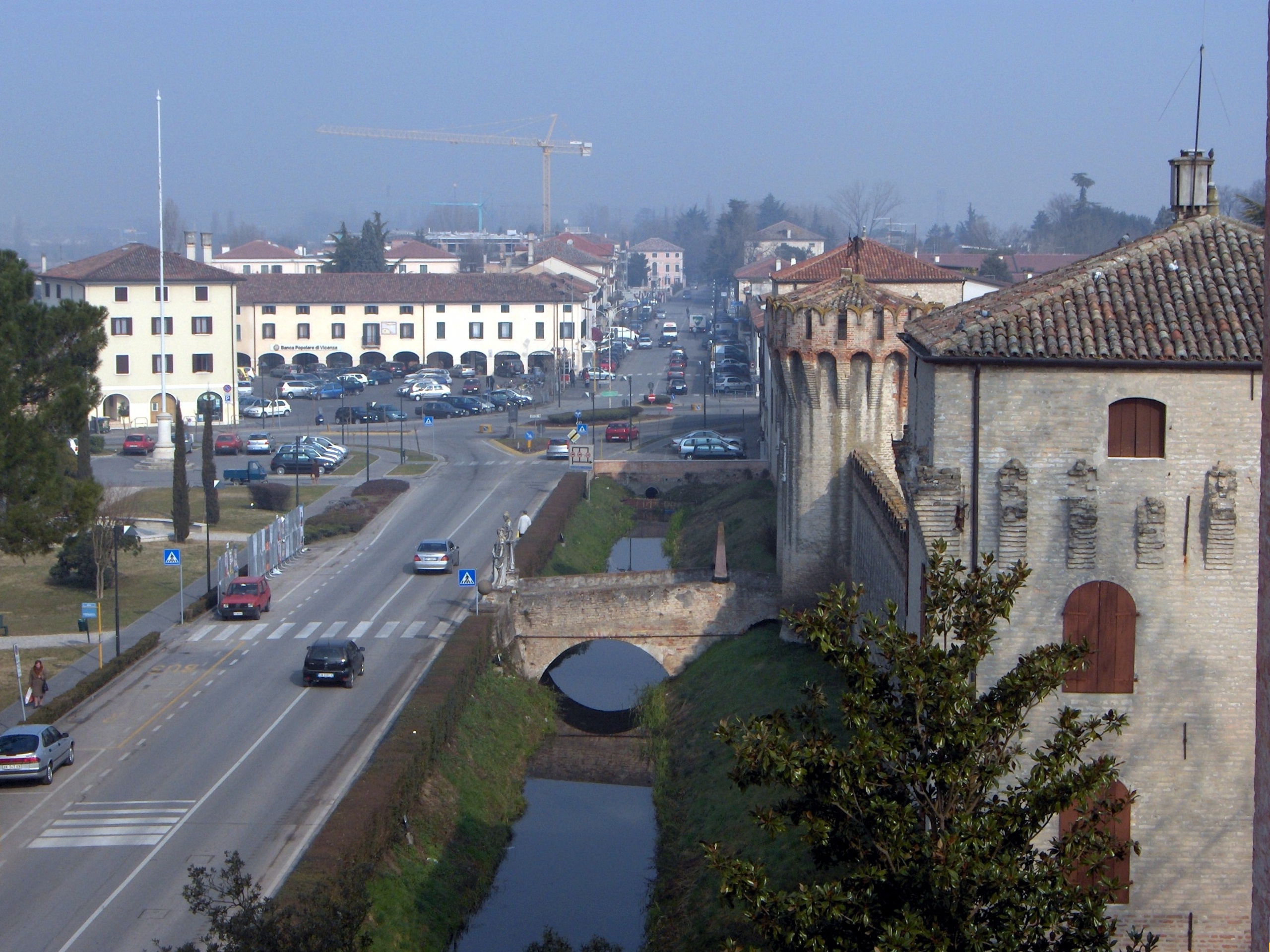 Cervellin, opera propria, veduta di Roncade (TV) italy, lic. GFDL, data 17/03/2005.